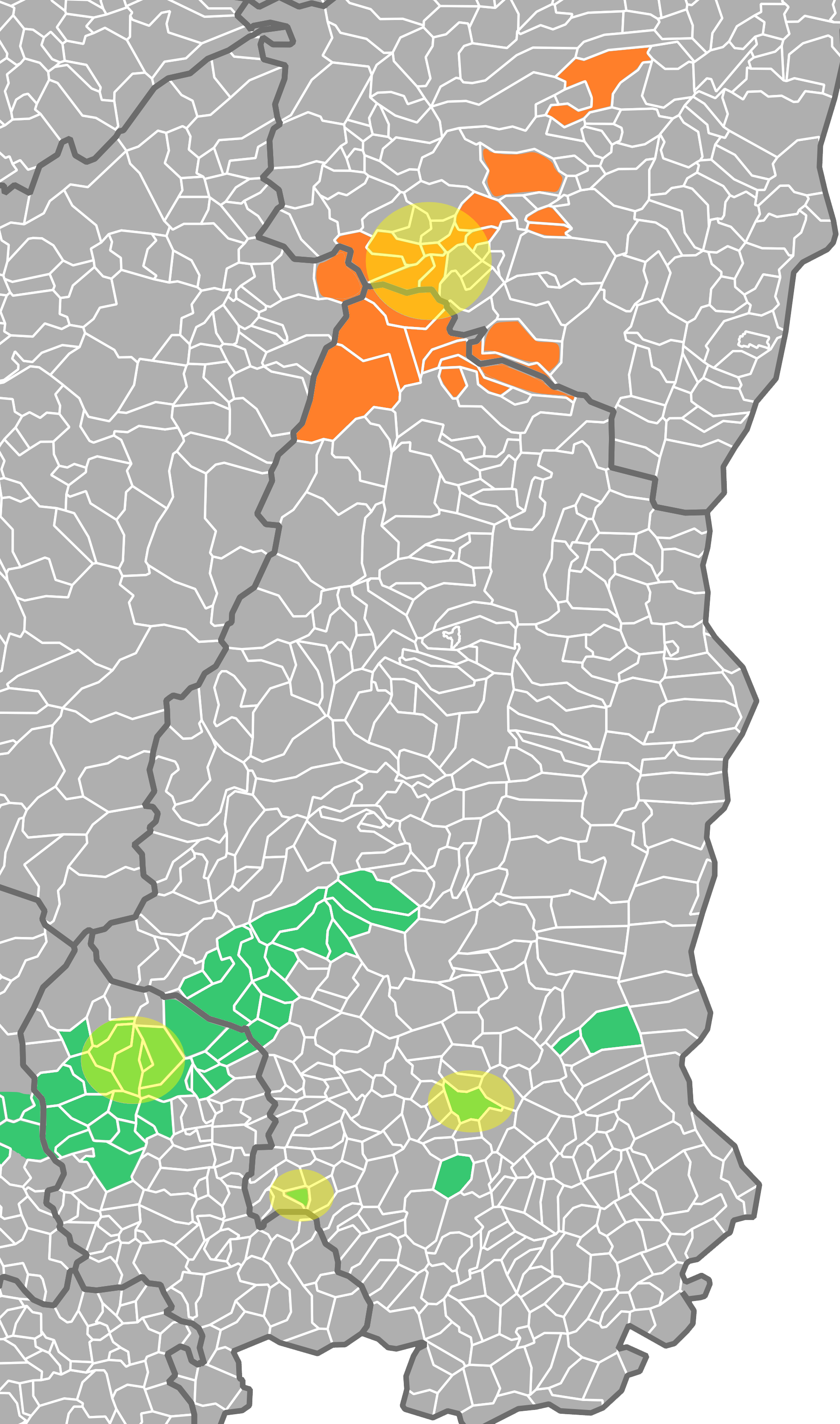 Carte indiquant les recherches réalisé par Compagnie départemental du Haut-Rhin pour la recherche de houille.